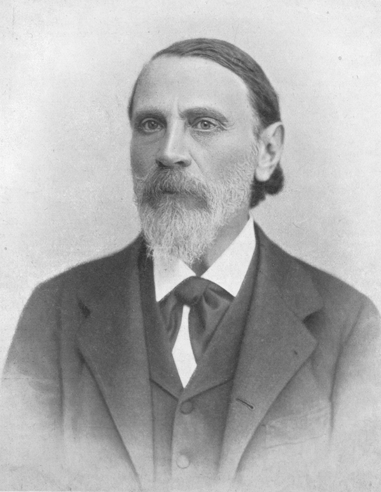 Moriz Benedikt (1835-1920)